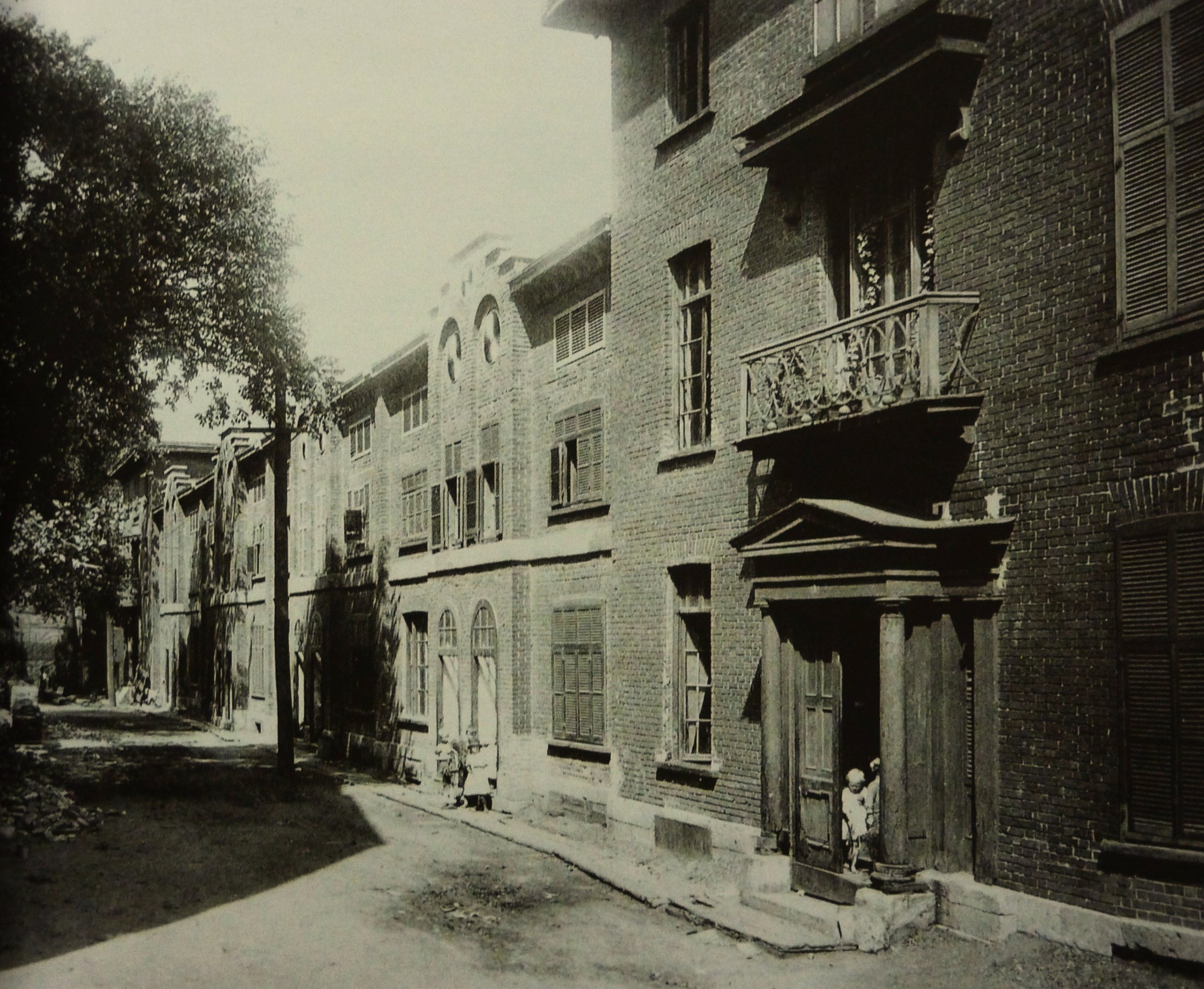 Archives Nationales du Canada. Ensemble de maisons en rangée comprenant dix résidences, construit vers 1844 sur l'emplacement de l'antique résidence de la famille Molson. À l'origine de chics habitations bourgeoises avec vue sur le fleuve, elles sont graduellement tombées en désuétude au fur et à mesure de l'expansion industrielle du secteur. La Molson Terrace a finalement été démolie vers 1920 pour faire place à une extention de la brasserie du même nom. Source: Montréal, une aventure urbaine, volume 3. Repérez ces bâtiments sur une carte de 1907